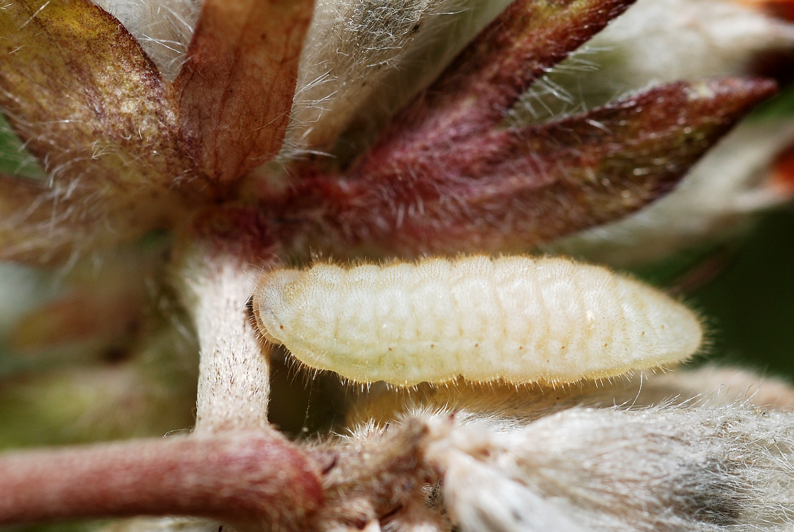 Cupido minimus caterpillar